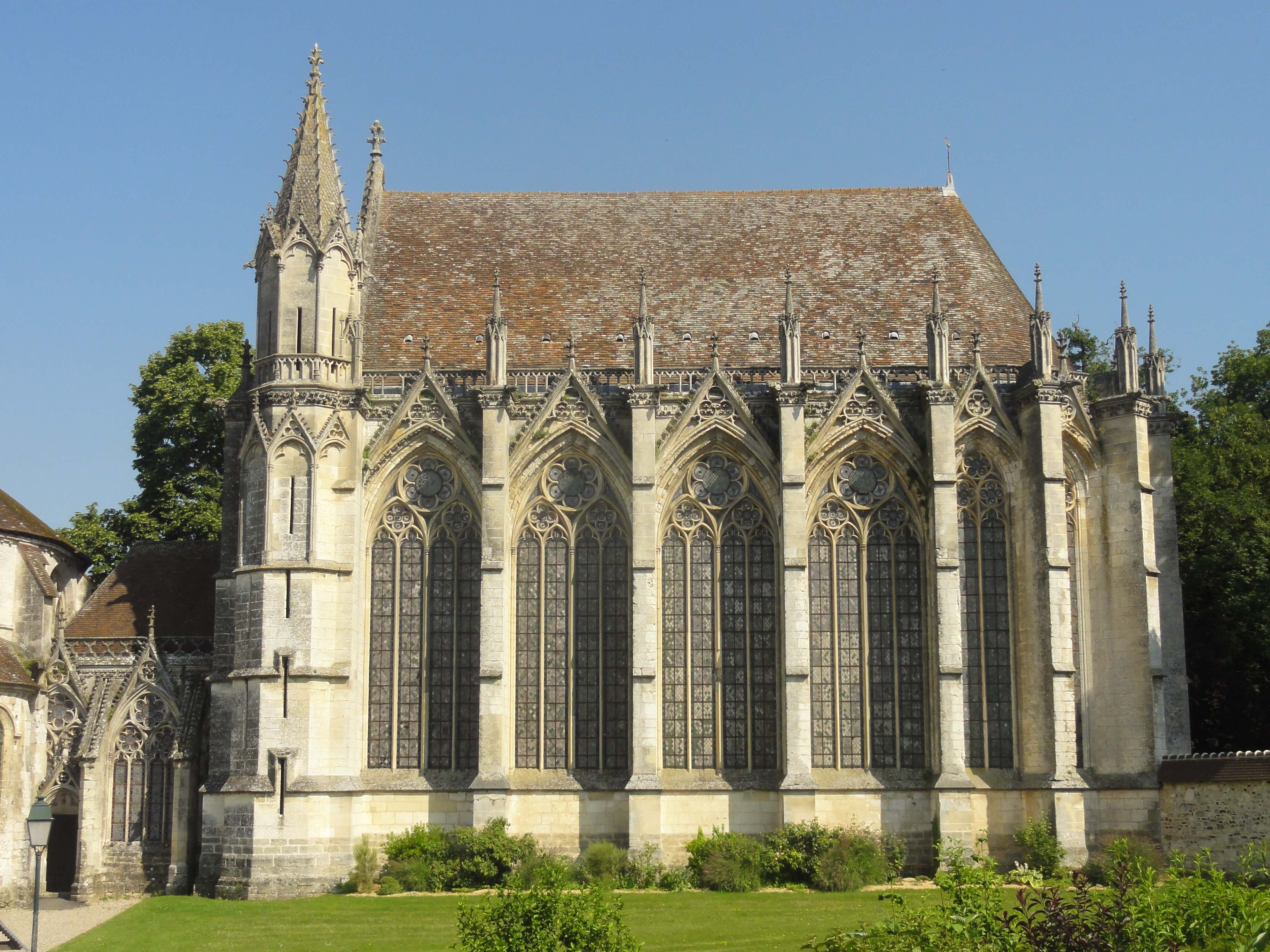 Sainte-chapelle de Saint-Germer-de-Fly - voir le titre du fichier.